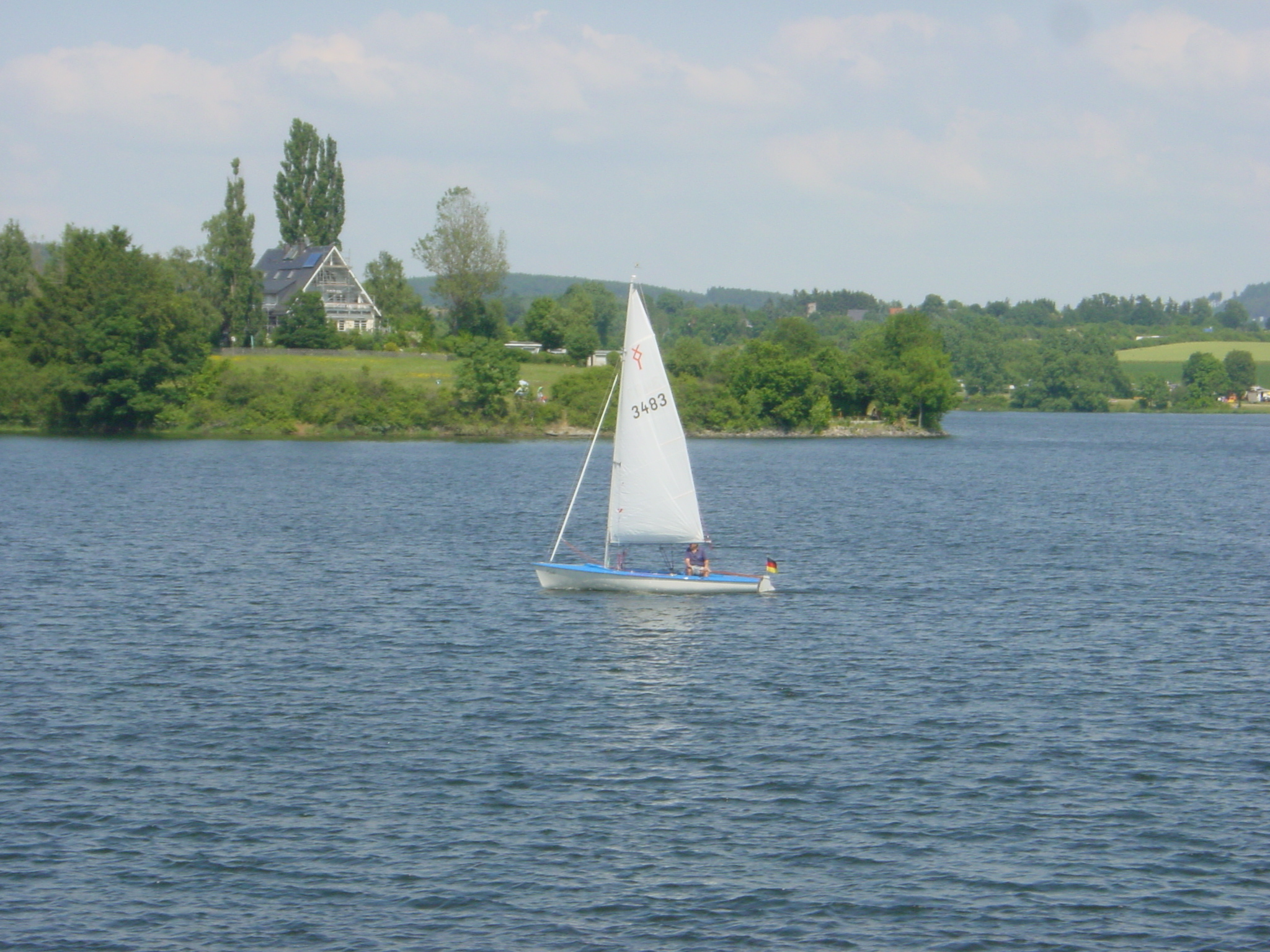 Ixylon in sportlichen Einsatz auf der Talsperre Pirk, Vogtland.